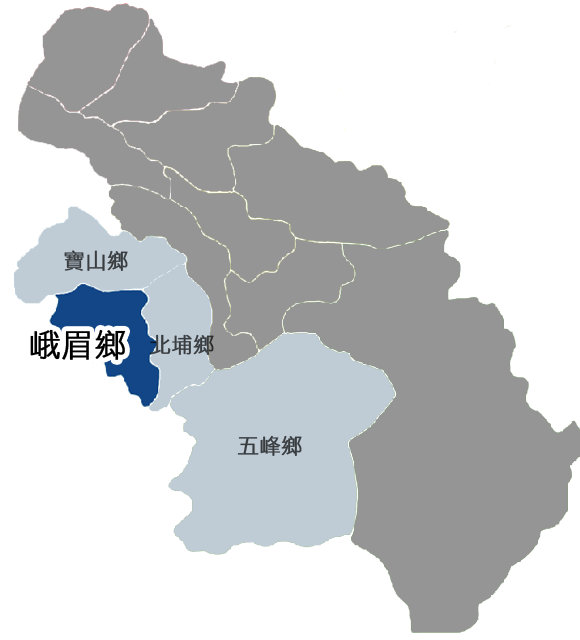 峨眉鄉相對位置。